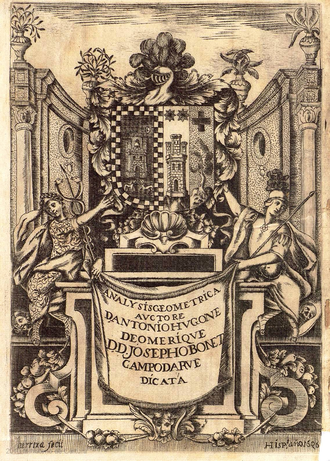 Analysis geometrica sive Nova, et vera methodus resolvendi tam problemata geometrica quam arithmeticas quaestiones : pars prima de planis authore D. Antonio Hugone de Omerique ...